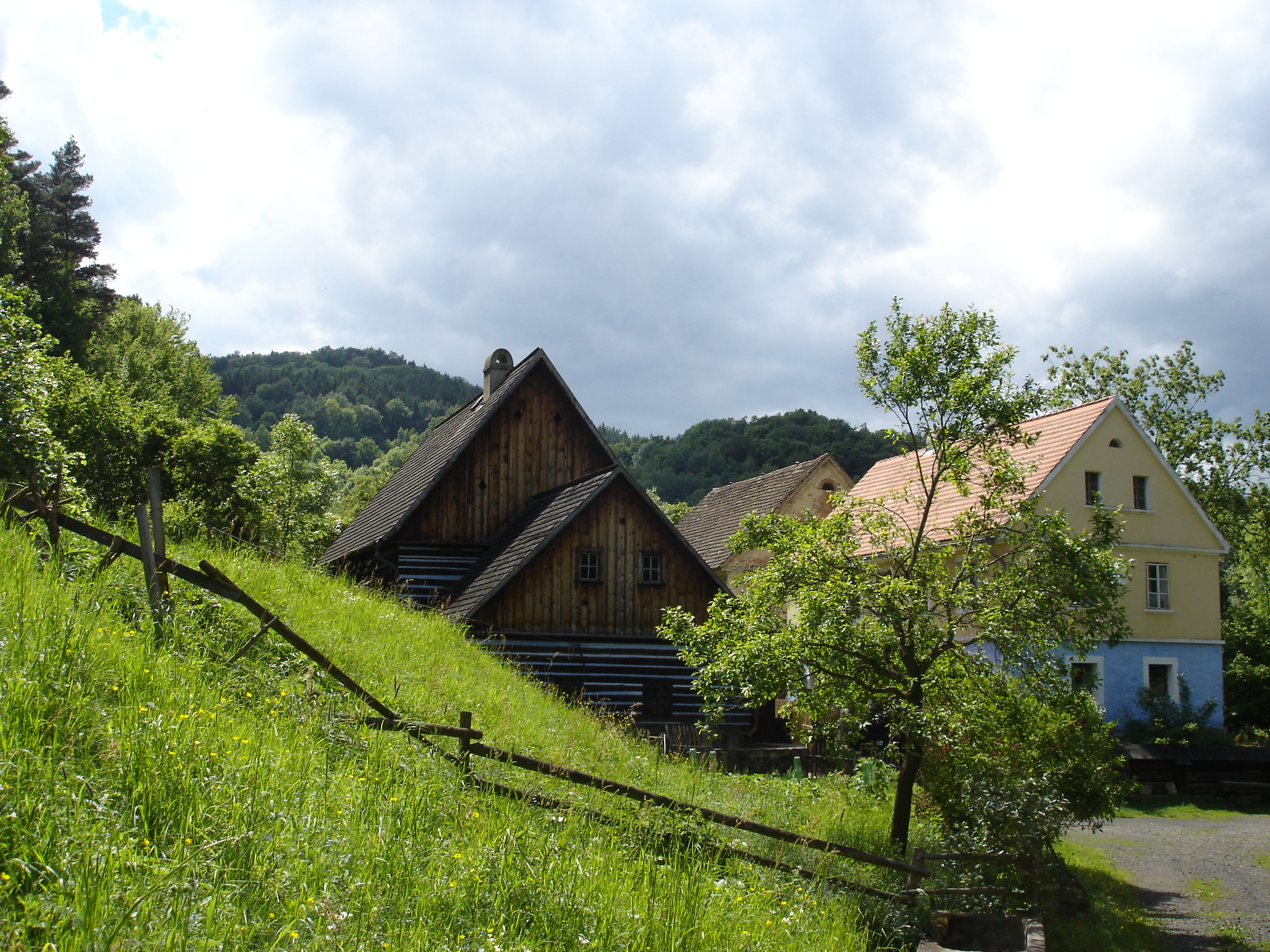 Zubrnice - Týniště, Starý mlýn